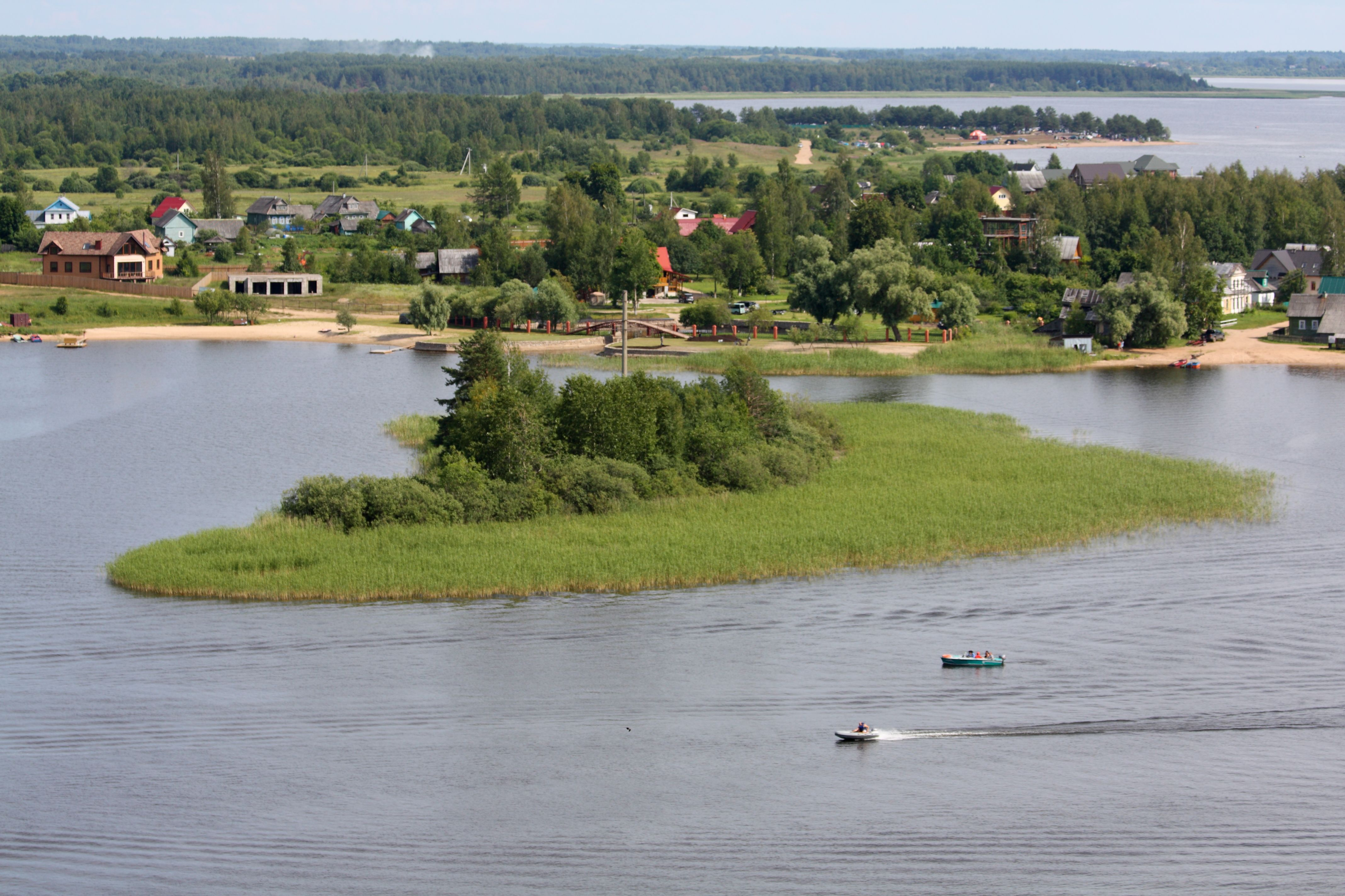 Озеро Селигер, островок около Столобенского острова. Снимок сделан с колокольни Богоявленского собора Нило-Столобенской пустыни. На заднем плане - деревни Ляпино (слева) и Пески